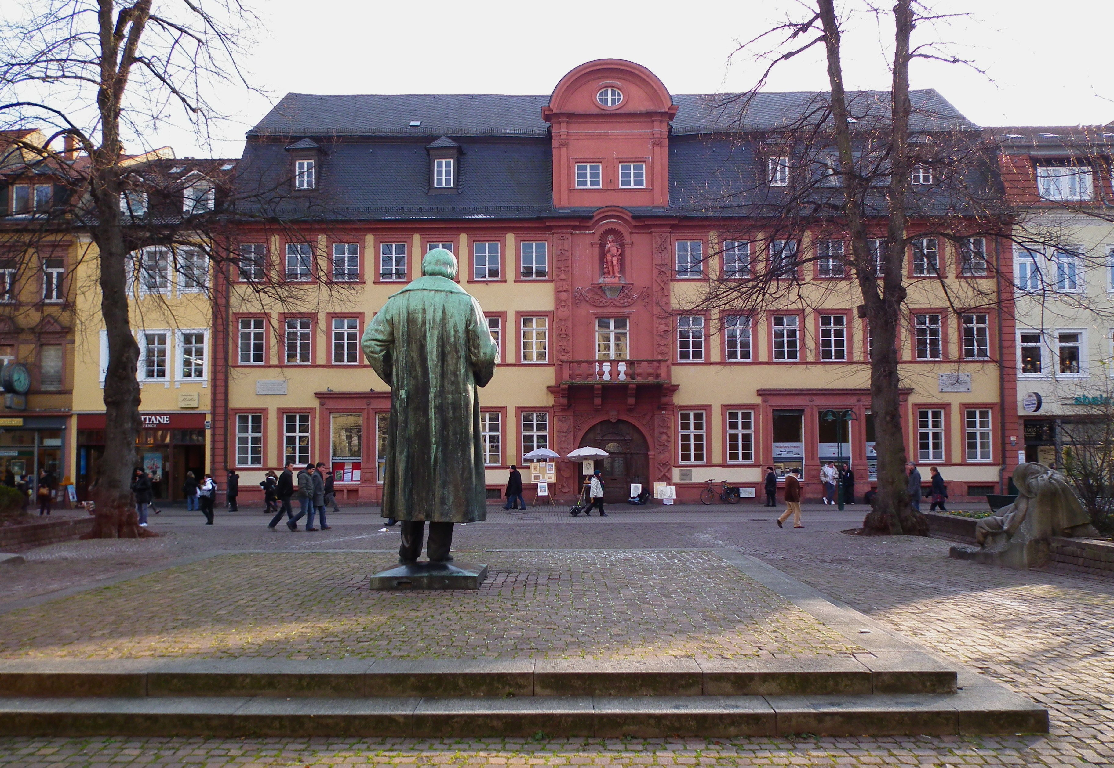 Haus zum Riesen, davor Rückseite der Statue von Robert Wilhelm Bunsen in der Heidelberger Altstadt (Baden-Württemberg, Deutschland). Im Jahr 1707 ließ Eberhard Friedrich von Venningen das Haus zum Riesen in Heidelberg errichten. Baumeister war Johann Adam Breunig, der auch das Jesuitenkolleg und die Alte Universität baute. Das Haus wurde mit ausdrücklicher Erlaubnis des Kurfürsten aus Quadersteinen des teilweise gesprengten Dicken Turmes des Heidelberger Schlosses errichtet. Das Haus verdankt seinen Namen der von Heinrich Charrasky geschaffenen überlebensgroßen Statue des Bauherren, die in Höhe des zweiten Stockwerkes den Mittelrisalit ziert.